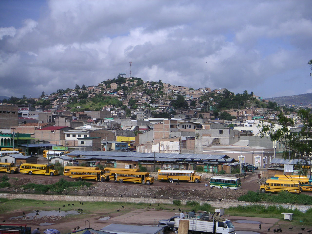 Tegucigalpa, Honduras. Photo: Soman